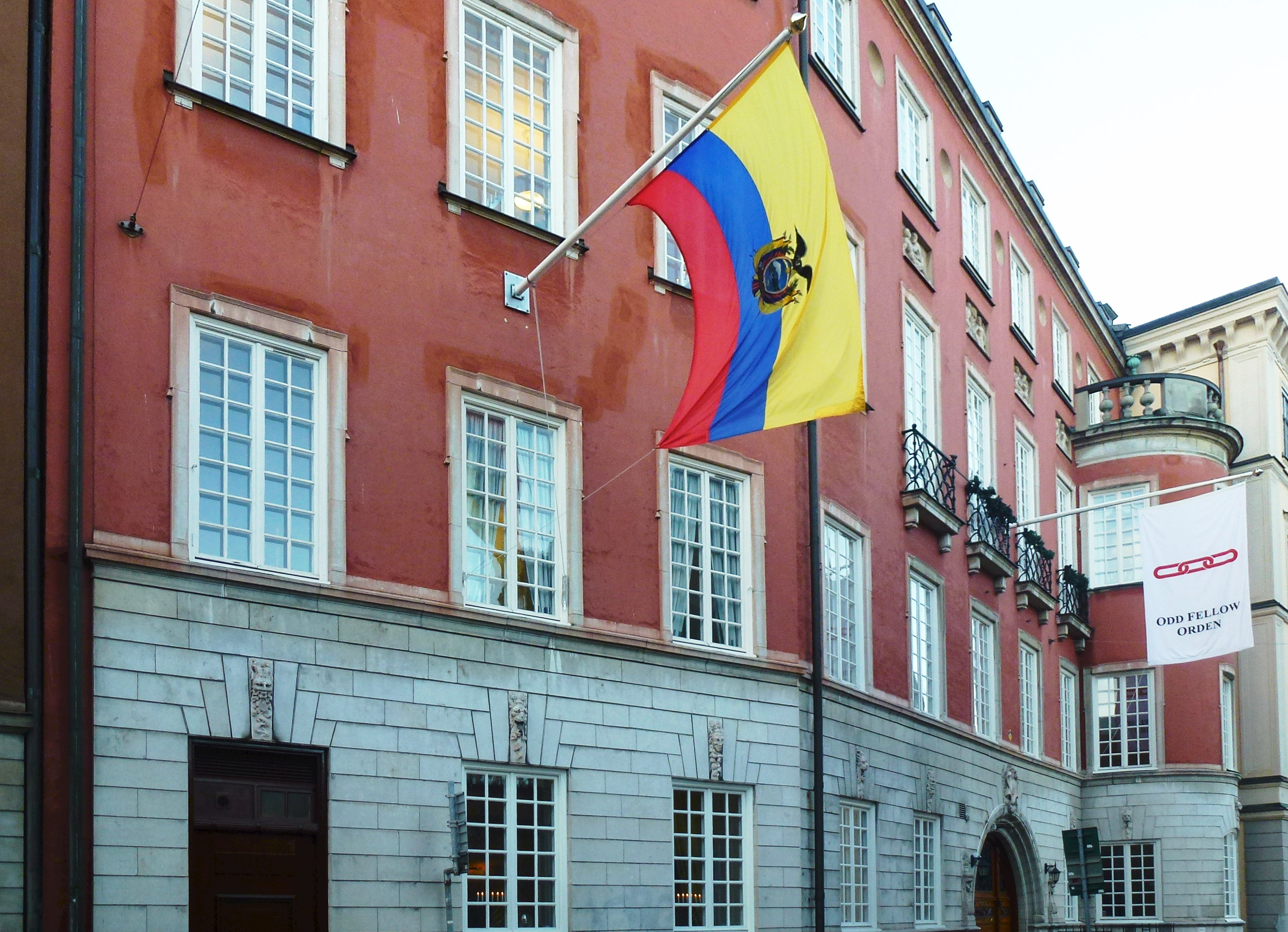 Ecuadors ambassad i Stockholm, Västra Trädgårdsgatan 11